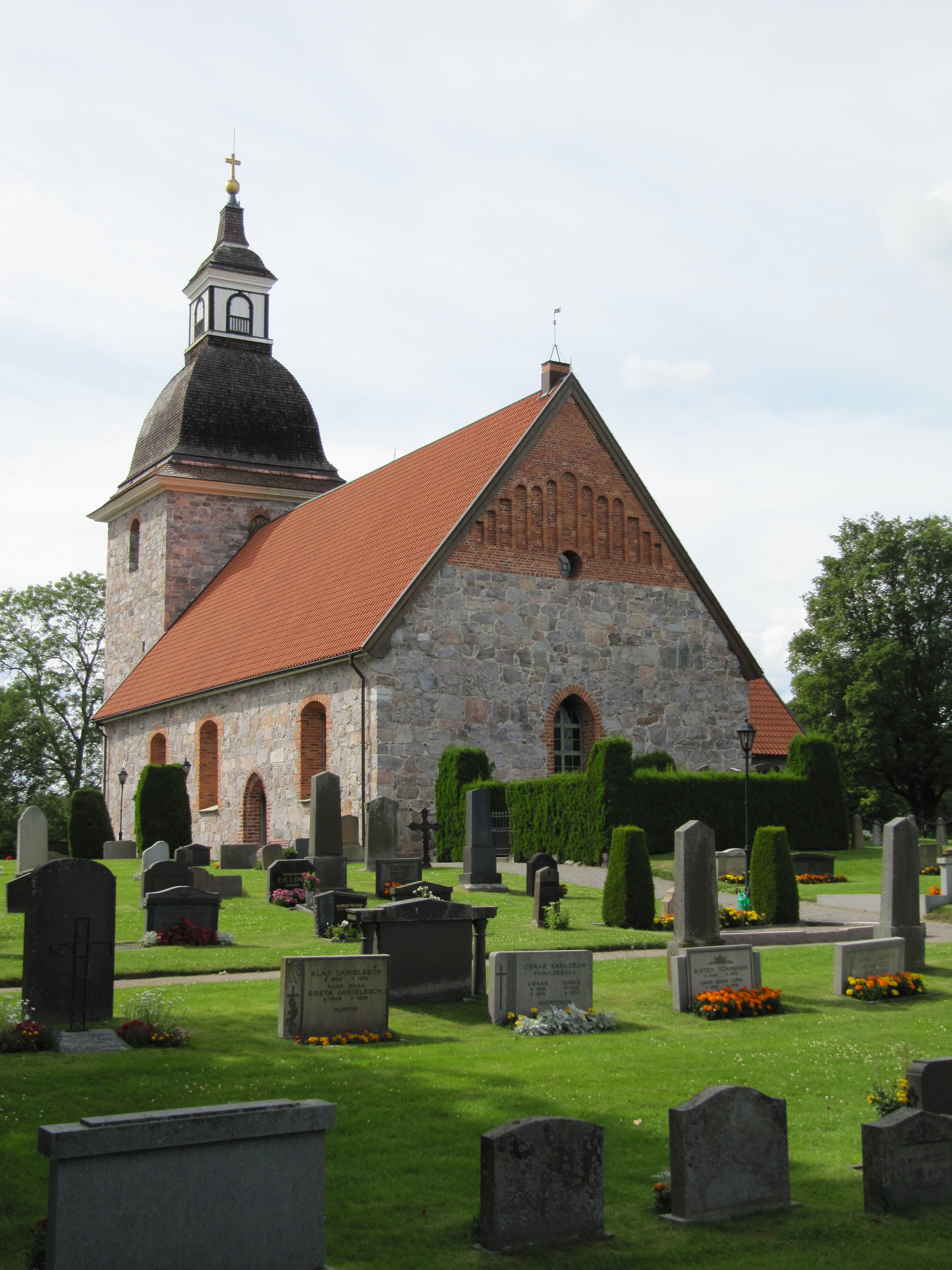 Törnsfalls kyrka